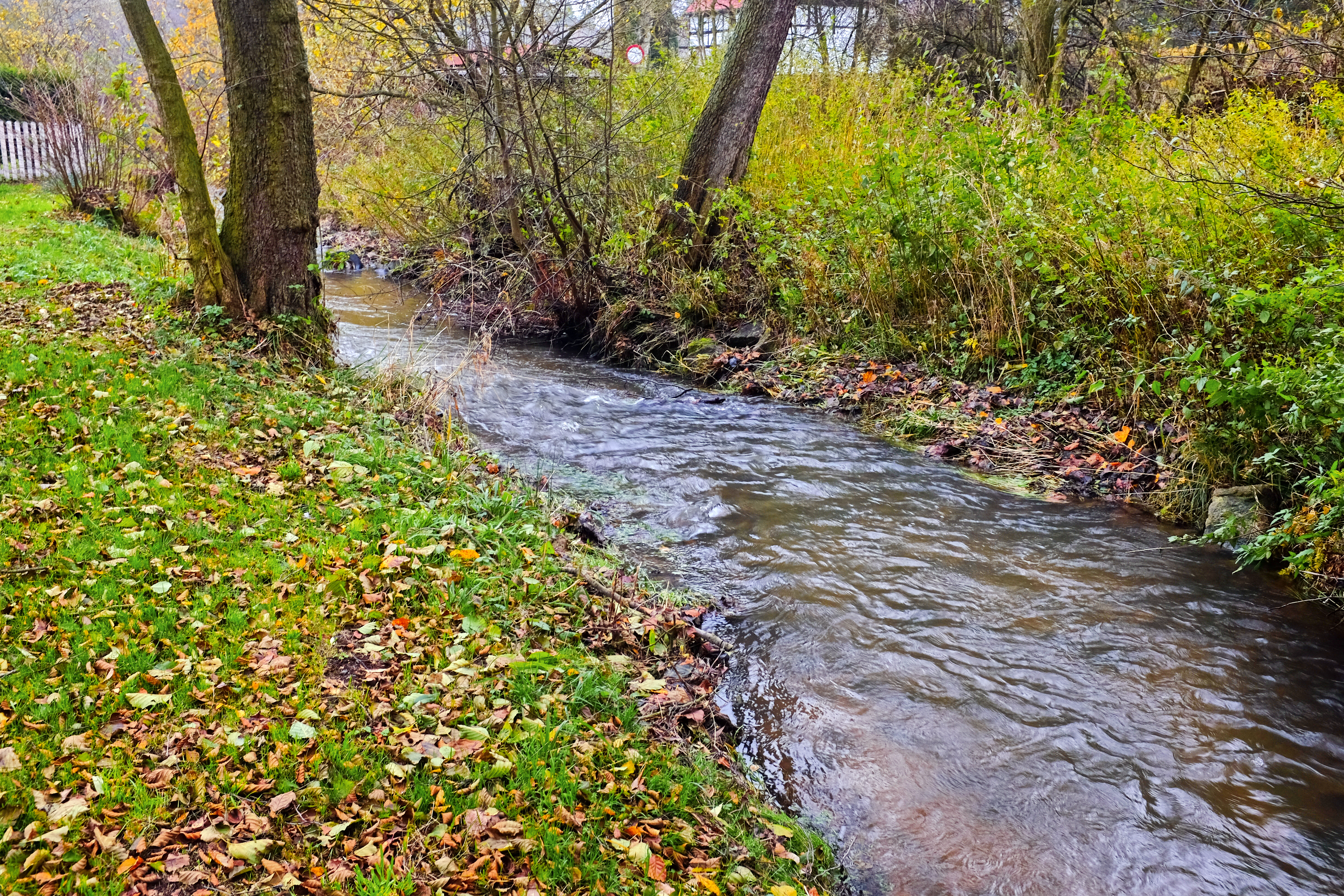 Vitický potok (též Dalovický potok) v Nivách, místní části Děpoltovic, přítok Ohře, okres Karlovy Vary